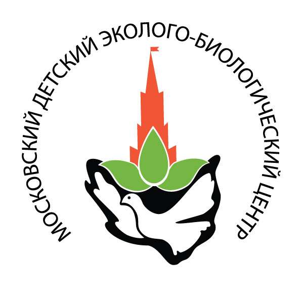 Логотип МДЭБЦ